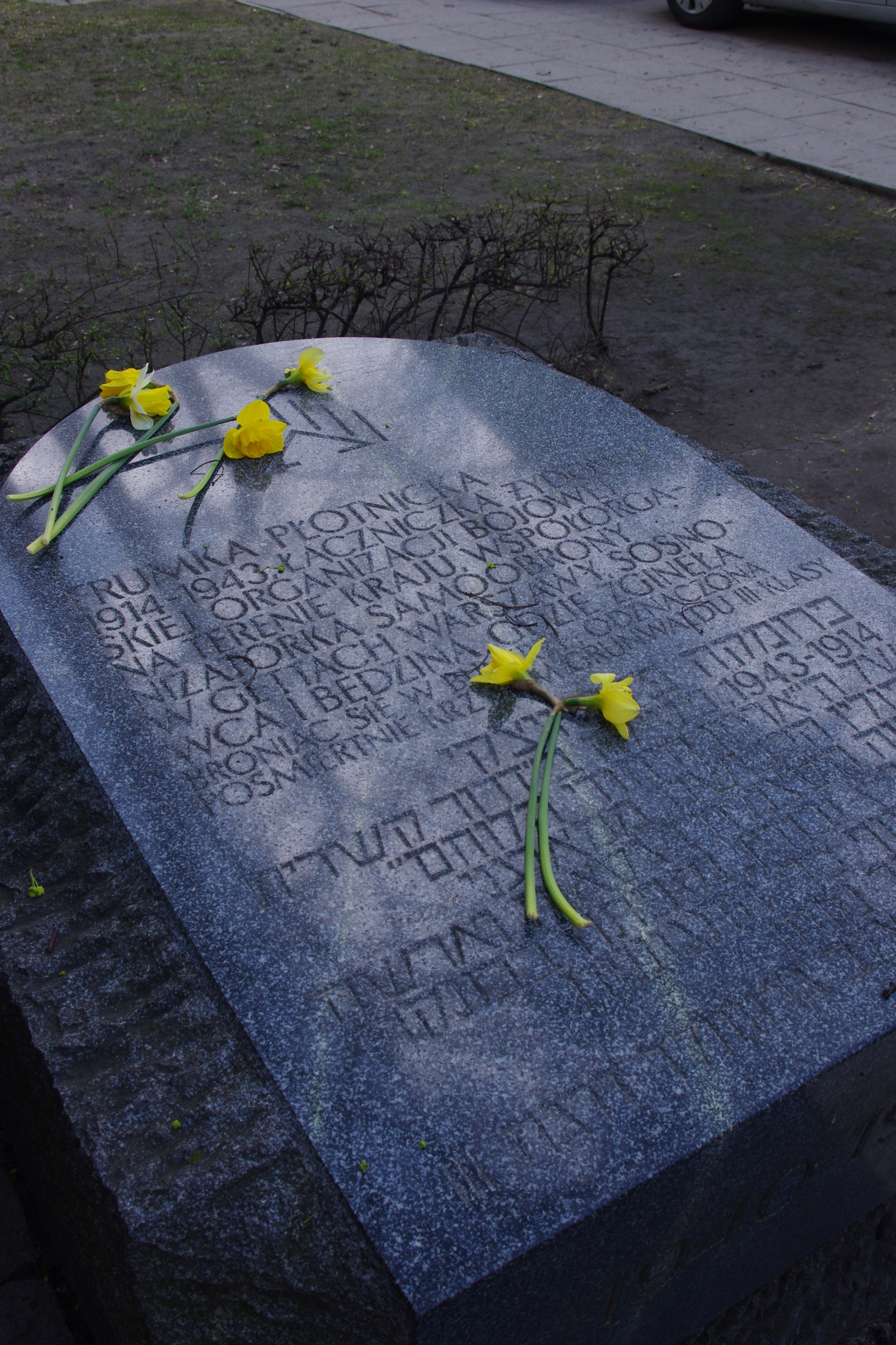 Kamień upamiętniający łączniczkę ŻOB-u - Frumkę Płotnicką na ul. Zamenhofa w Warszawie